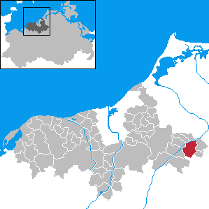 Thelkow in Mecklenburg-Western Pomerania - District Bad Doberan